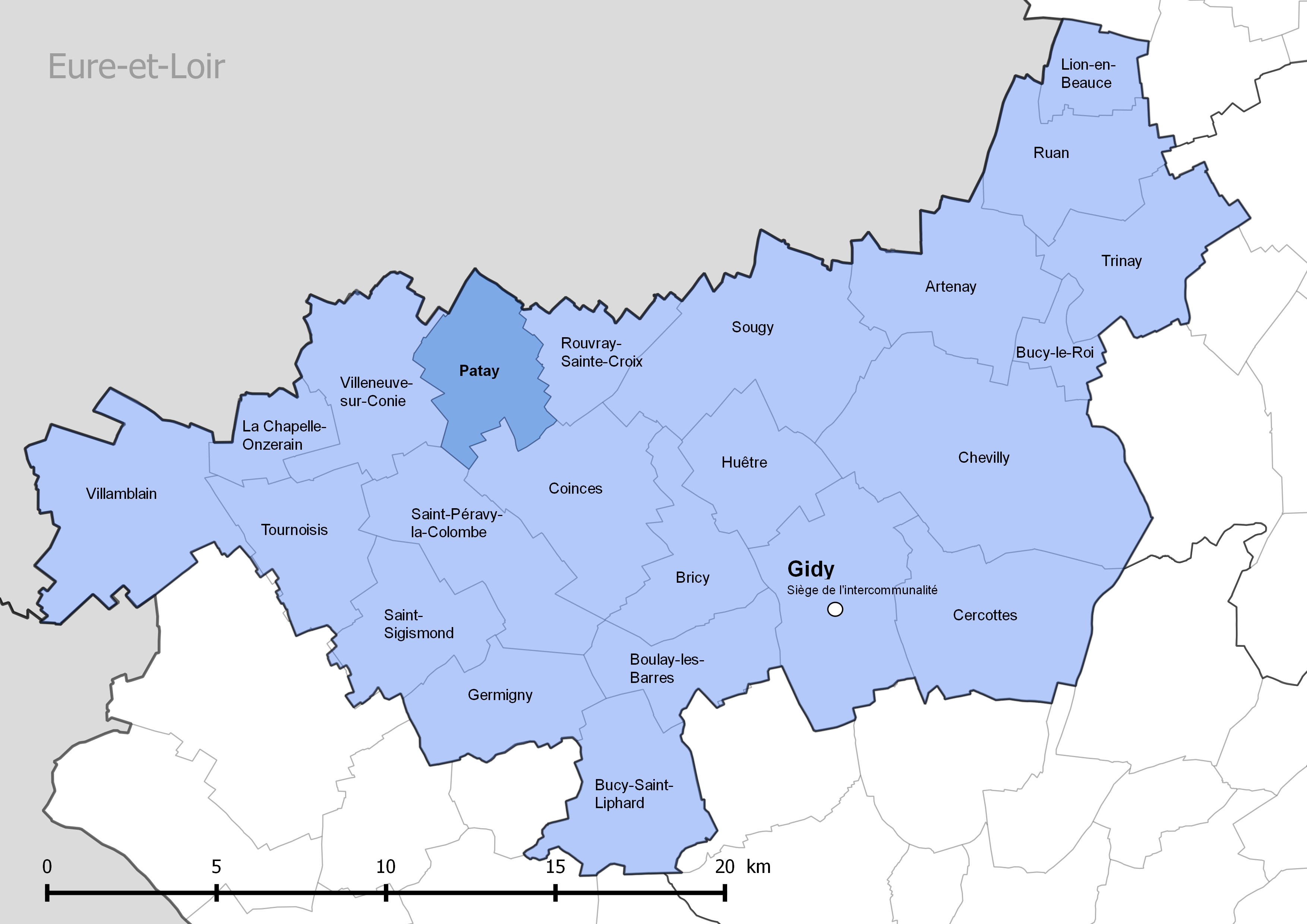 Périmètre de la communauté de communes de la Beauce loirétaine - Situation de la commune de Patay